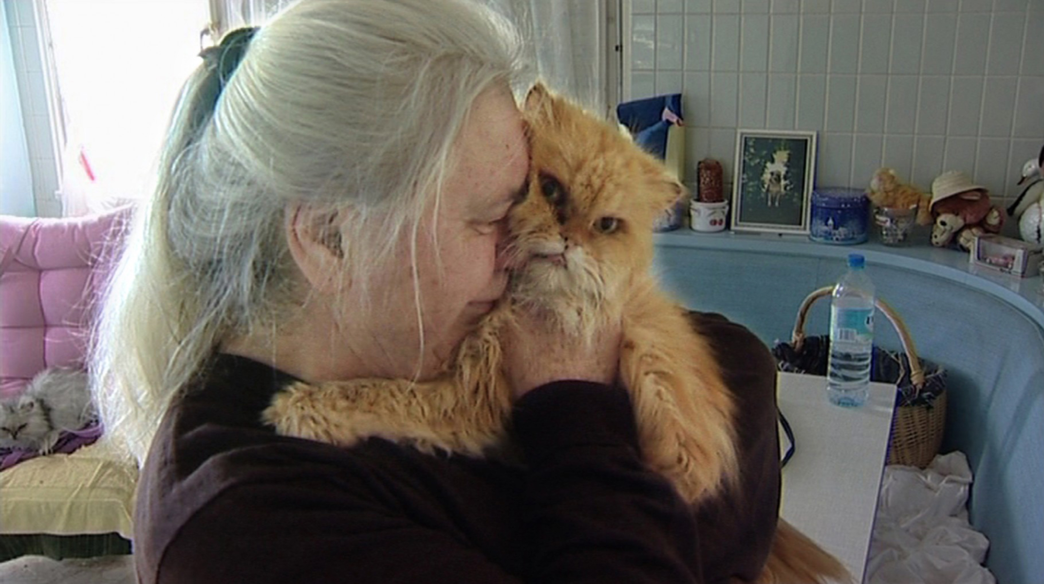 Image tirée de « Collection Premier Jour » de Fernand Melgar.